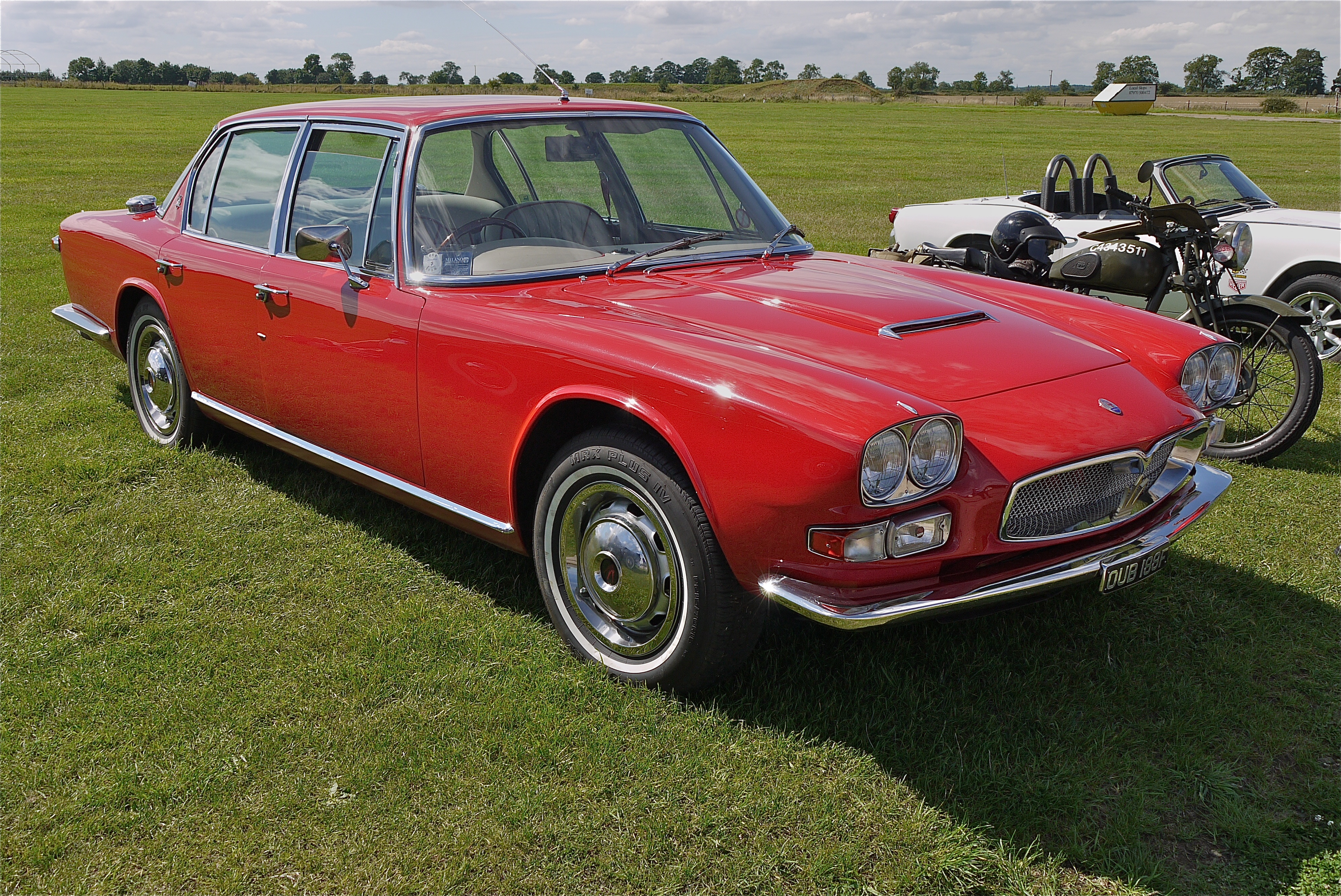 Panasonic G1 14-45 Lens